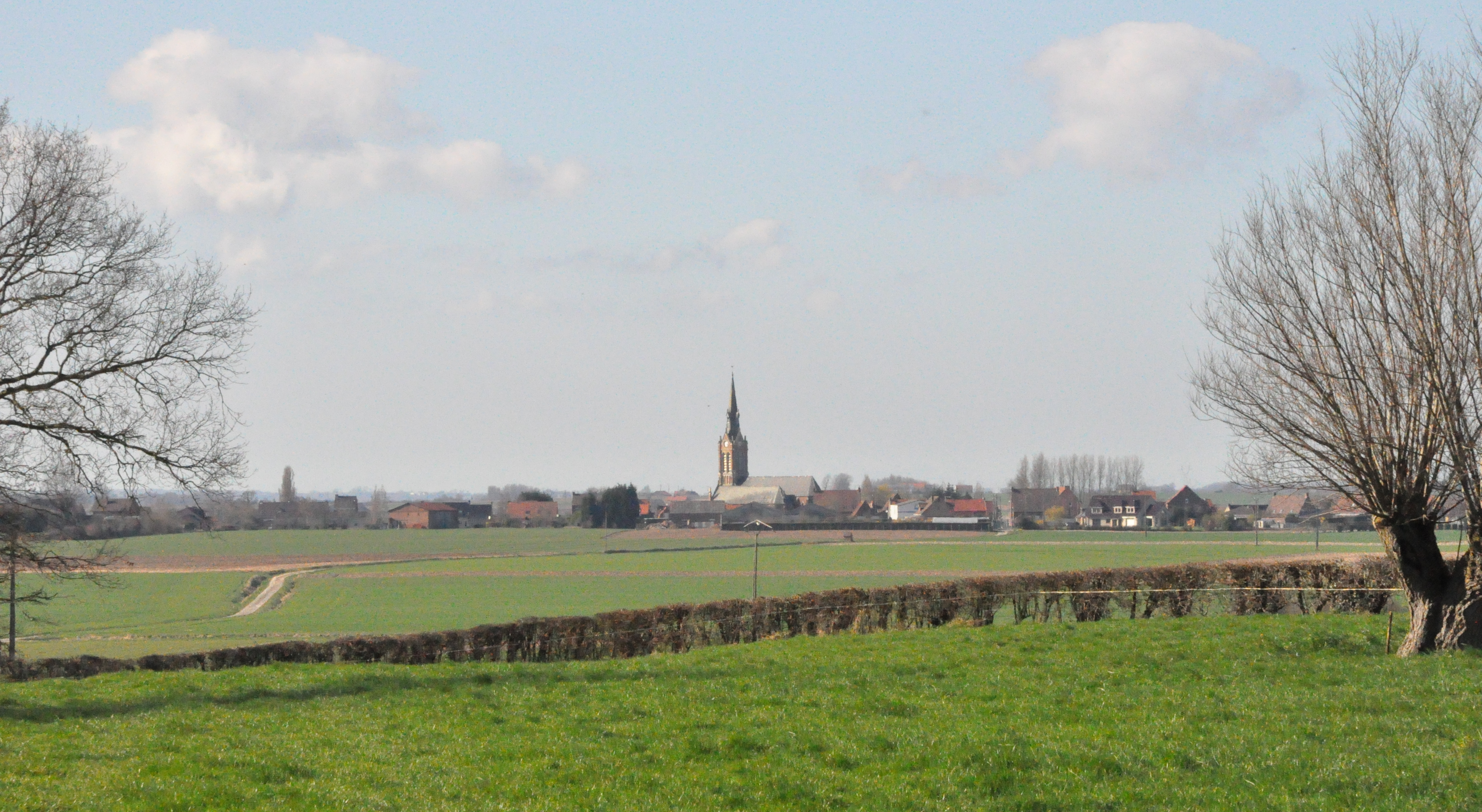 Village de Wallon-Cappel.jpg